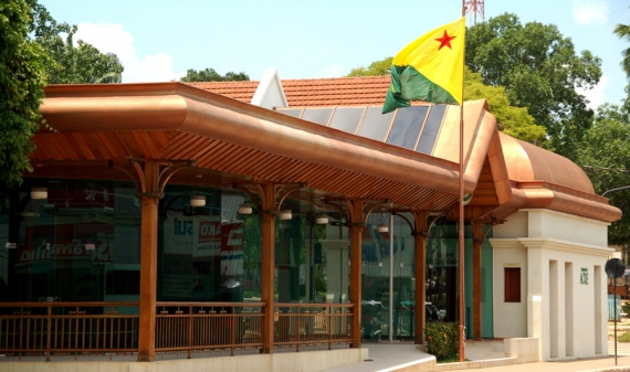 O complexo Memorial dos Autonomistas é um dos importantes símbolos da história acreana. Além do espaço permanente à exposição de artes plásticas, tem o Café do Theatro, que reúne diariamente pessoas de diferentes estilos e ideais. E também o Theatro Hélio Melo, um dos principais palcos da cultura do Estado que mantêm uma intensa programação de espetáculos de teatro e música.